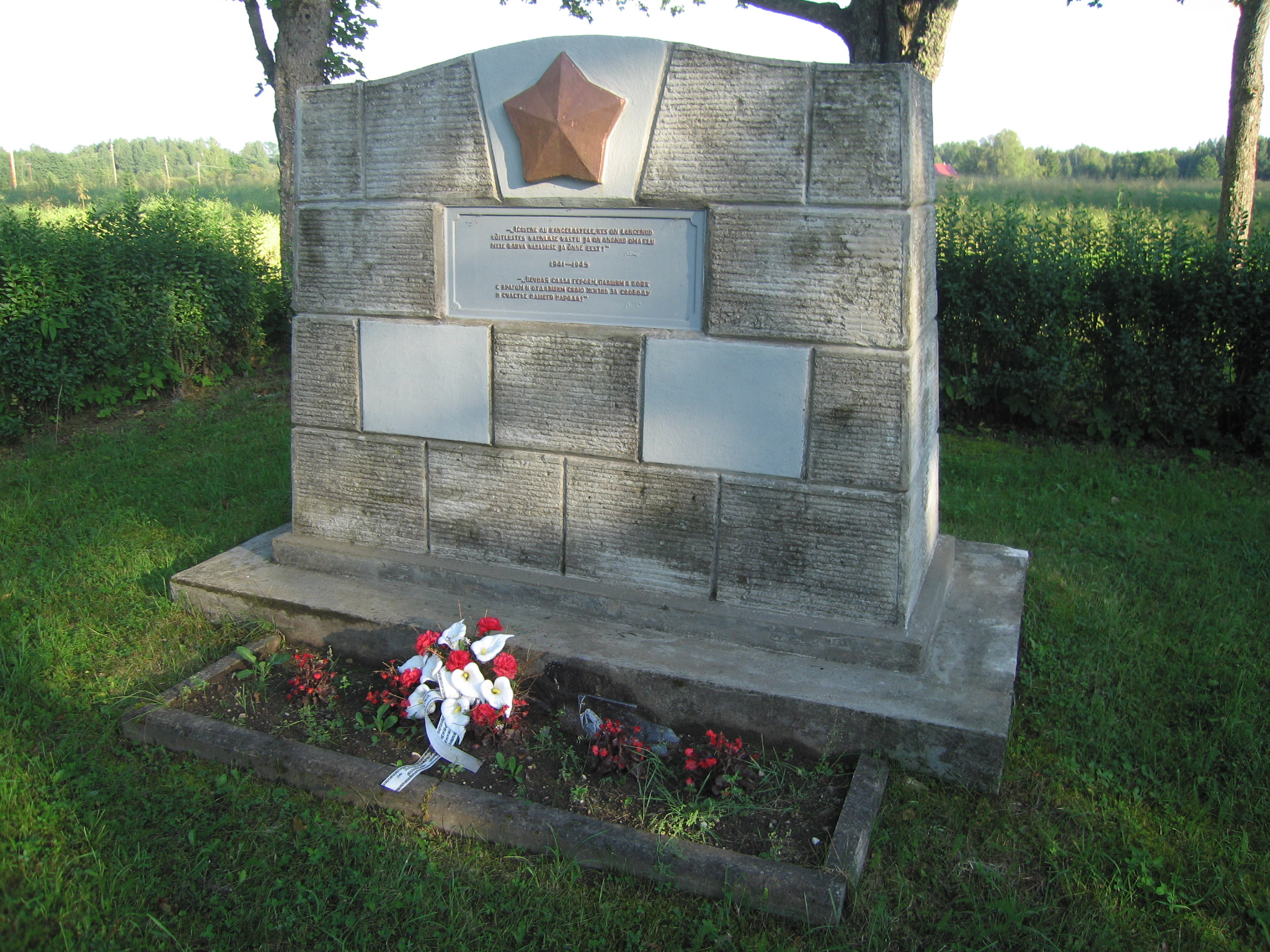 Mälestusmärk matmispaigal